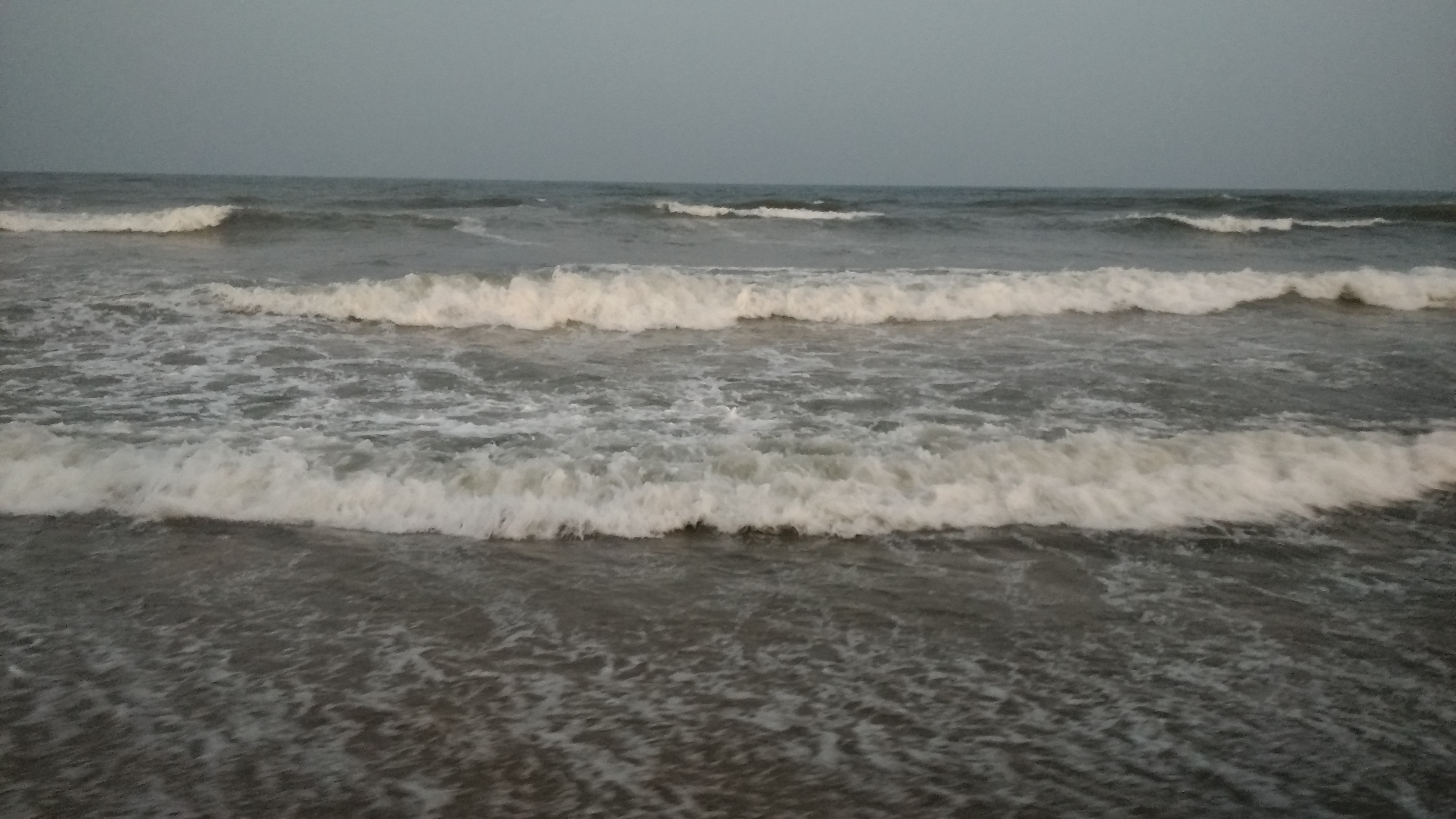 சென்னைக்கடலின் அலைகள், தமிழ்நாடு.